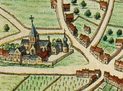 Carte de Liège de Blaeu Extrait: l'abbaye de Saint Giles